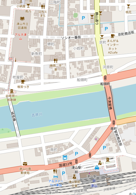 ソシオ一番街の周辺の地域図